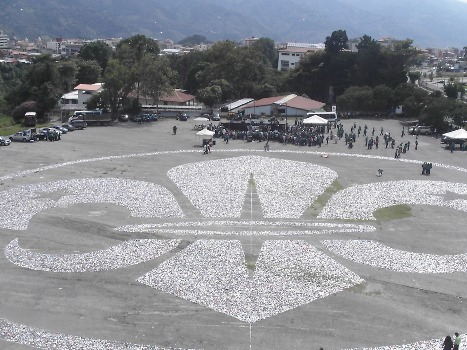 una vista panorámica amplia tomada desde lo alto de la Plaza de Toros, Flor de Lis Scout Mundial hecha con latas. Evento: Latazo 2008. Estacionamiento Plaza de Toros. Mérida, Estado Mérida